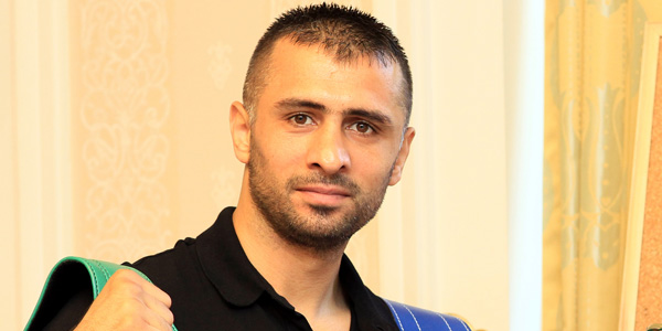 Selçuk Aydın 2016